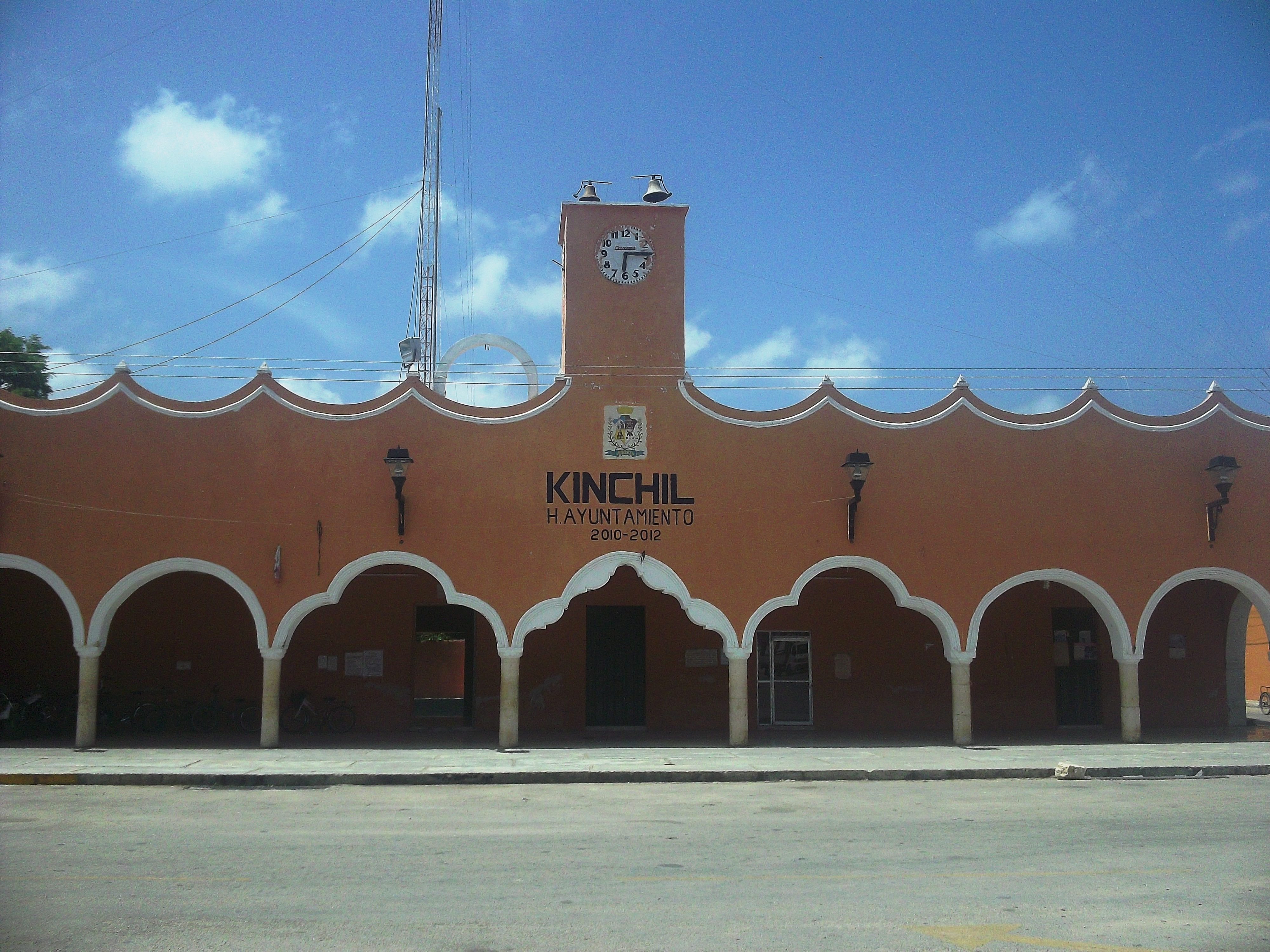 Palacio muncipal de Kinchil, Yucatán.